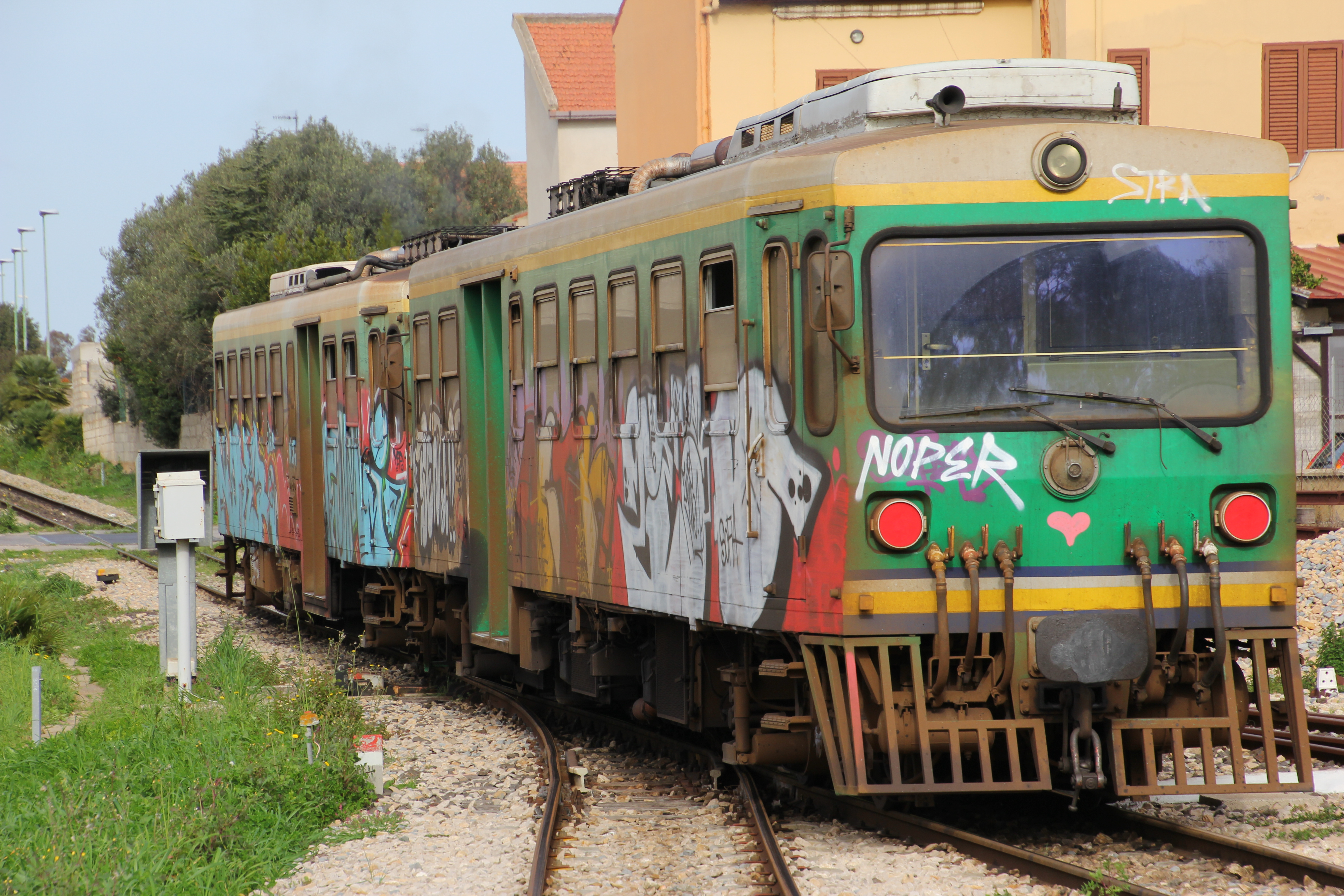 Olmedo - Stazione ferroviaria